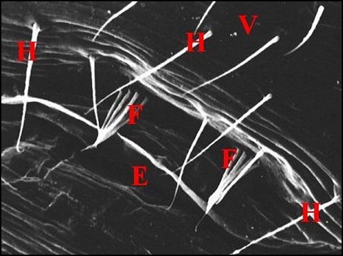 Fusules épigastriques d' Anelosimus eximius (Guyane) en vue globale au microscope électronique à balayage